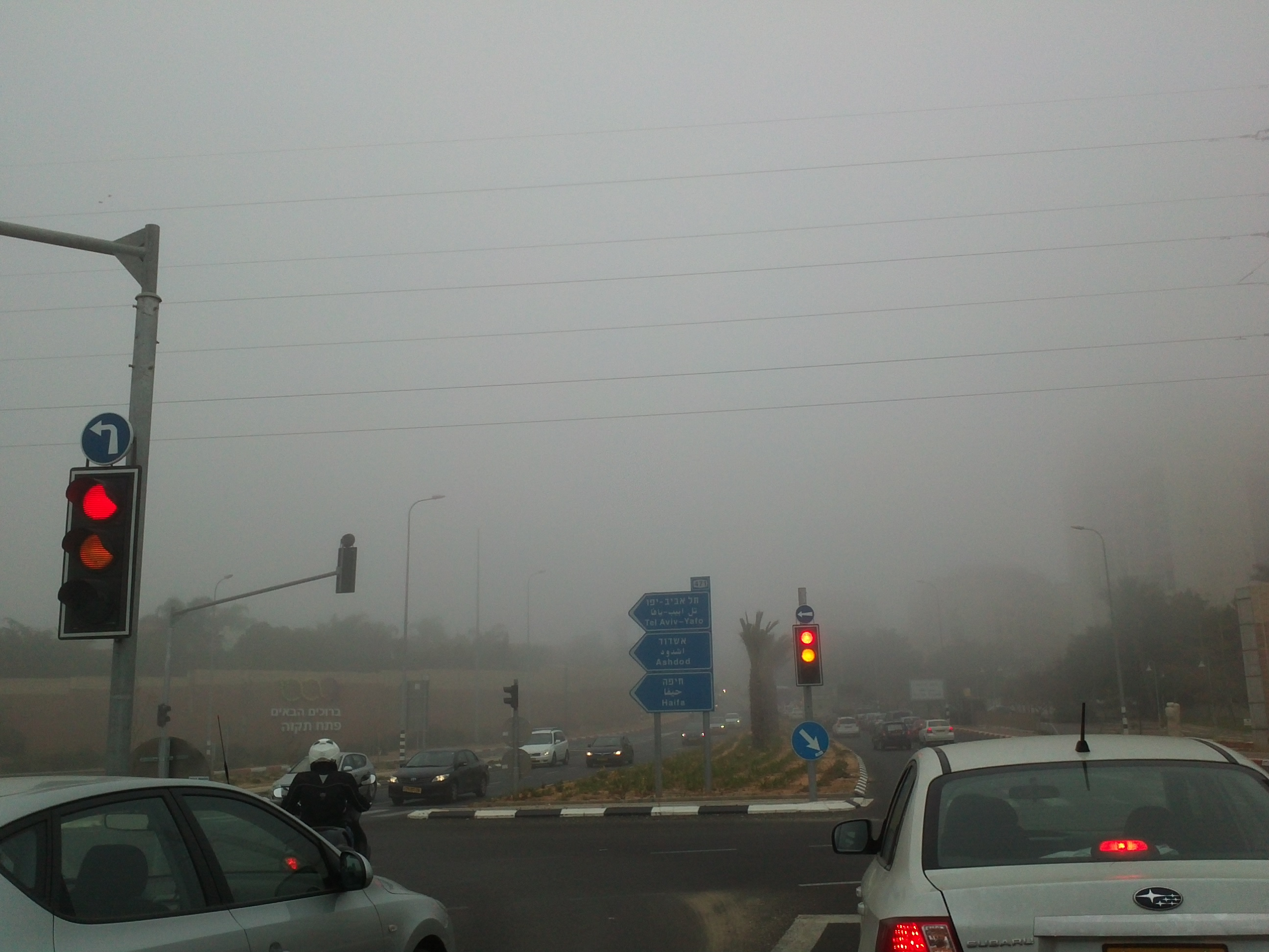 Туман в Израиле.